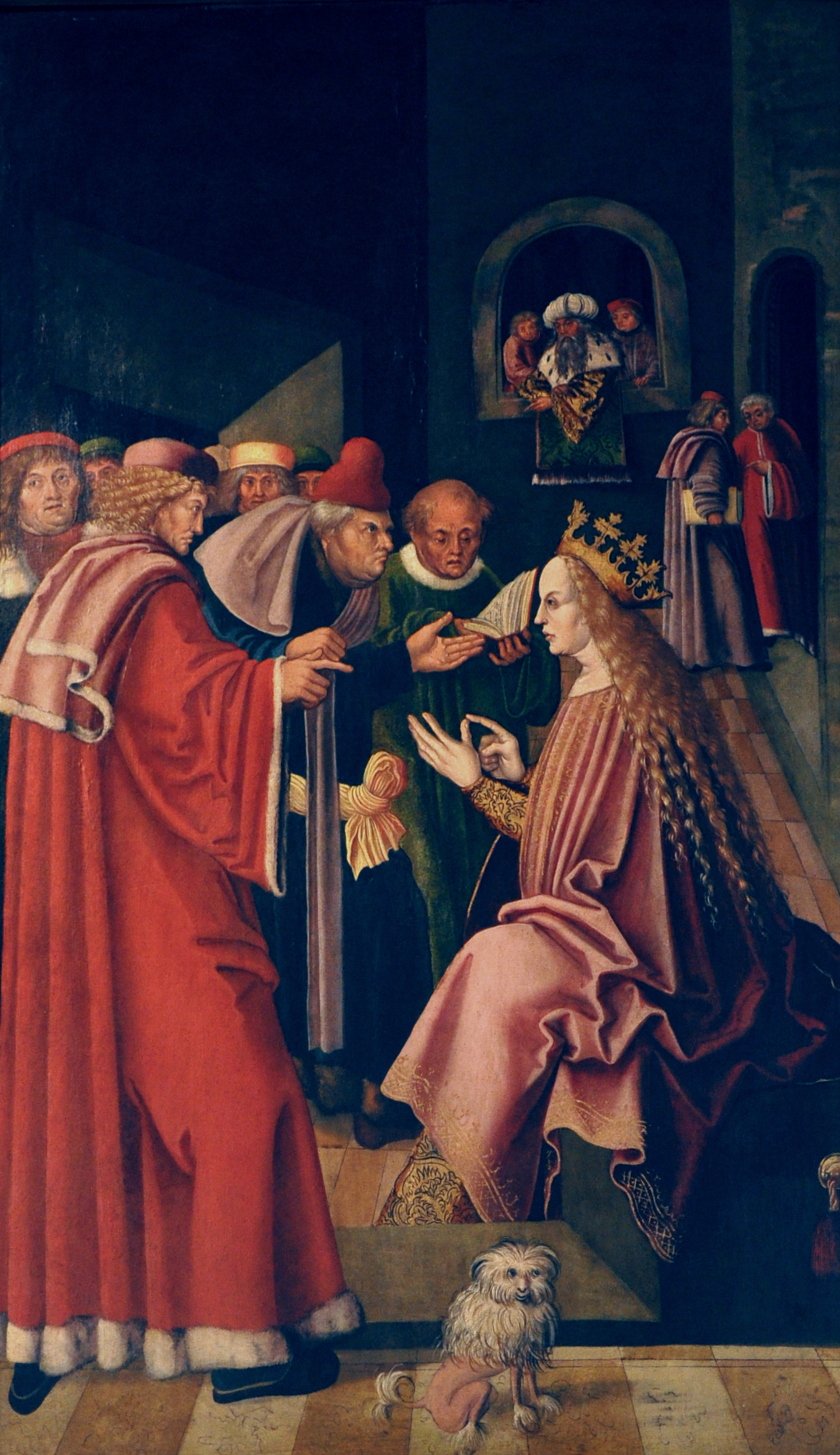 Disput der hl. Katharina mit den Philosophe